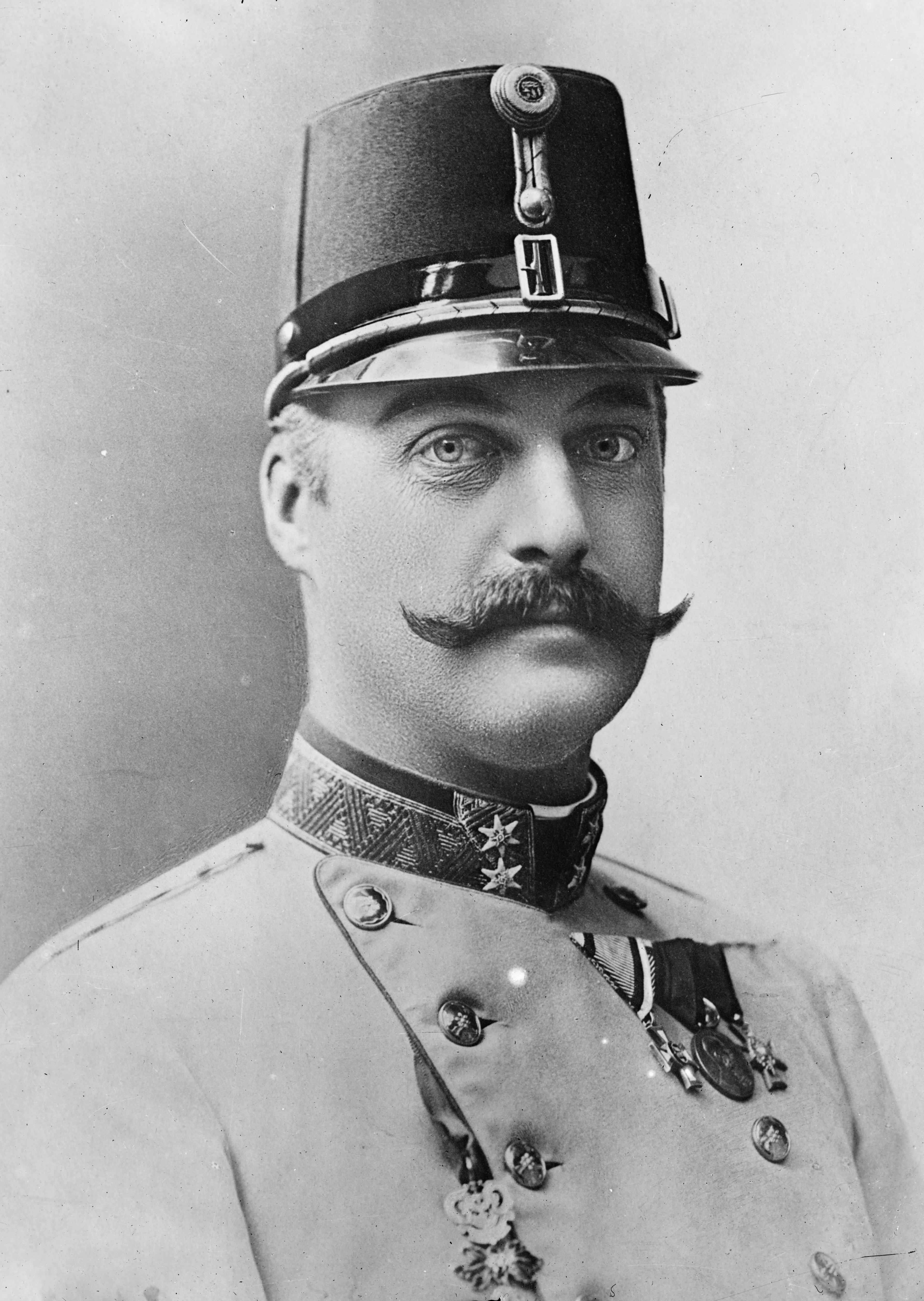 Erzherzog Leopold Salvator von Österreich-Toskana, Porträt von Carl Pietzner, 1905.[1]